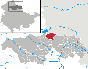 Steinthaleben in Thuringia - Kyffhäuserkreis